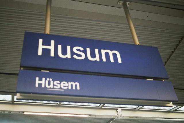 Hüsem stasjon